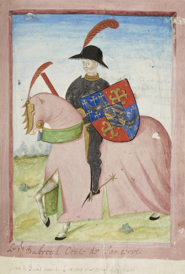 L'amiral Jean de Bueil, comte de Sancerre.